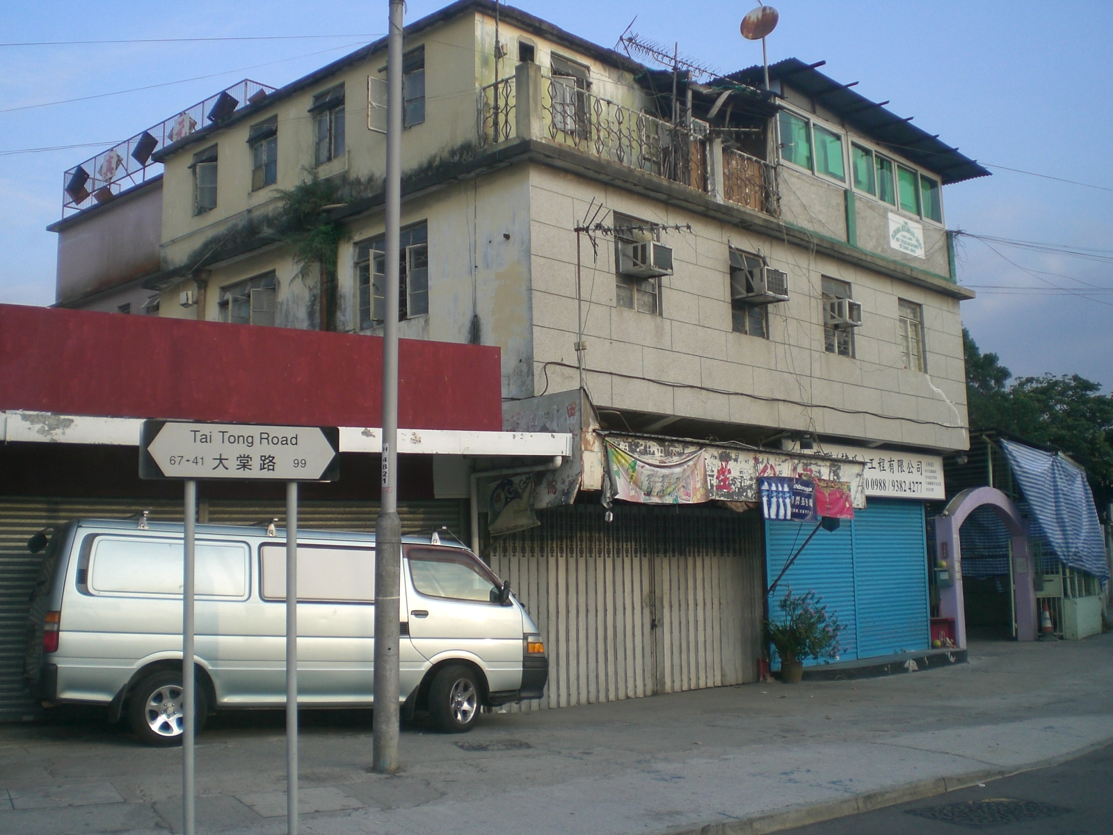 元朗大棠路